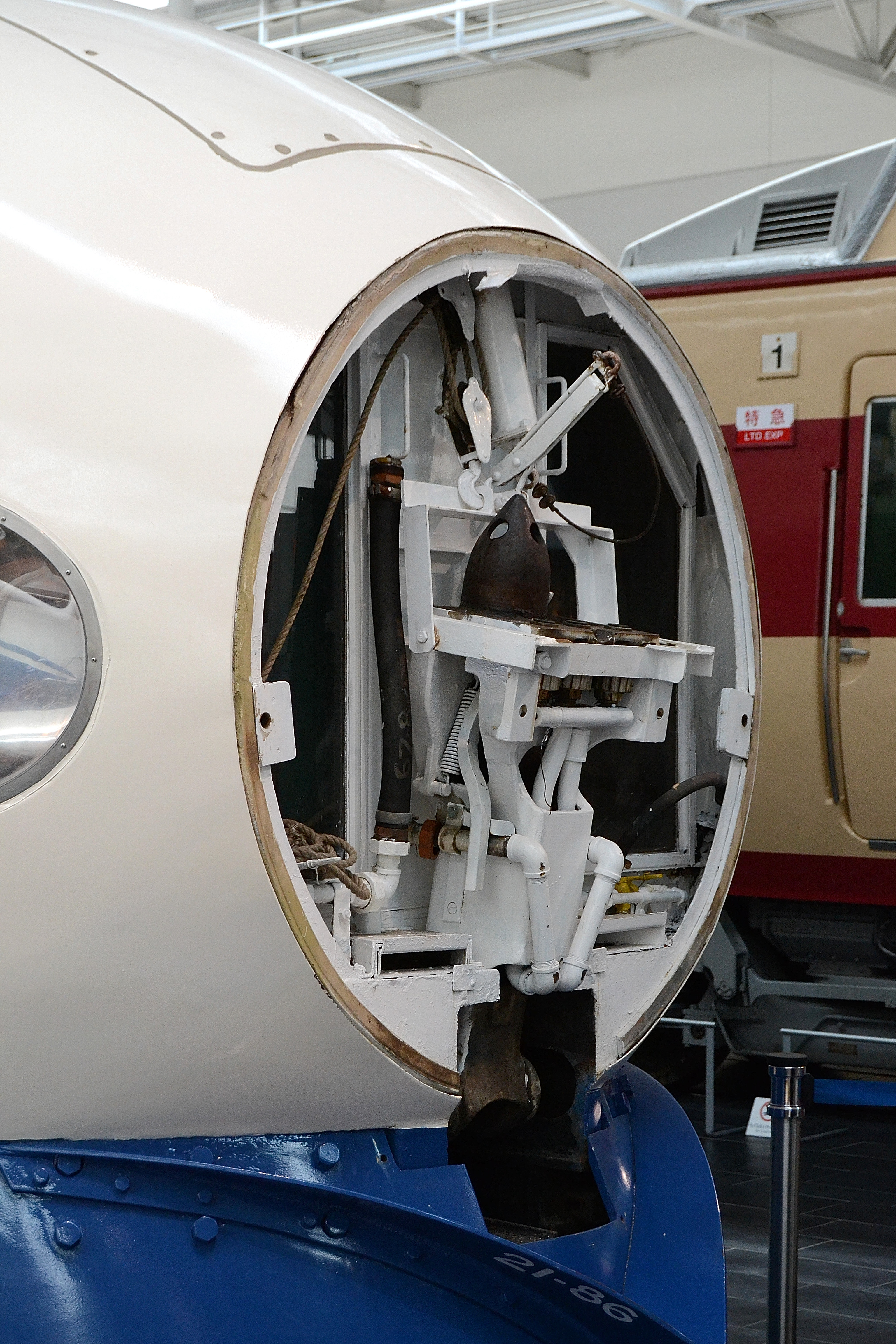 0系新幹線電車の先頭車の前頭部先頭に装備されている非常用連結器。先頭の丸いカバーが外されて収納された連結器が出ている状態。（リニア・鉄道館で撮影）